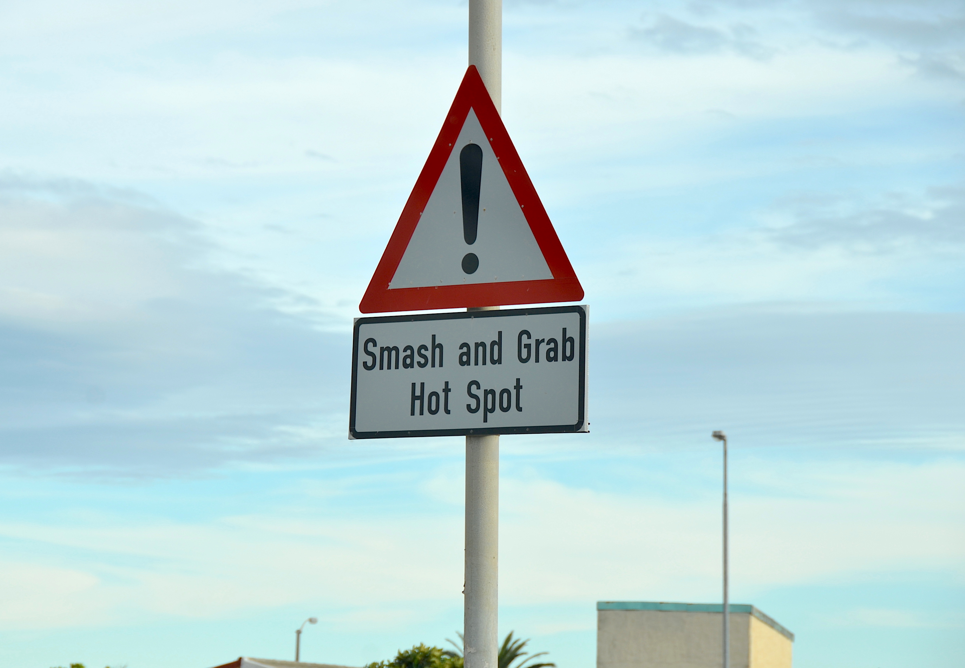 Smash and Grab Hot Spot in Retreat, M5 Straße (Südafrika)